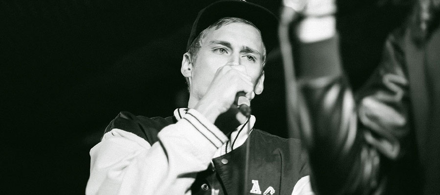 Gettomasa